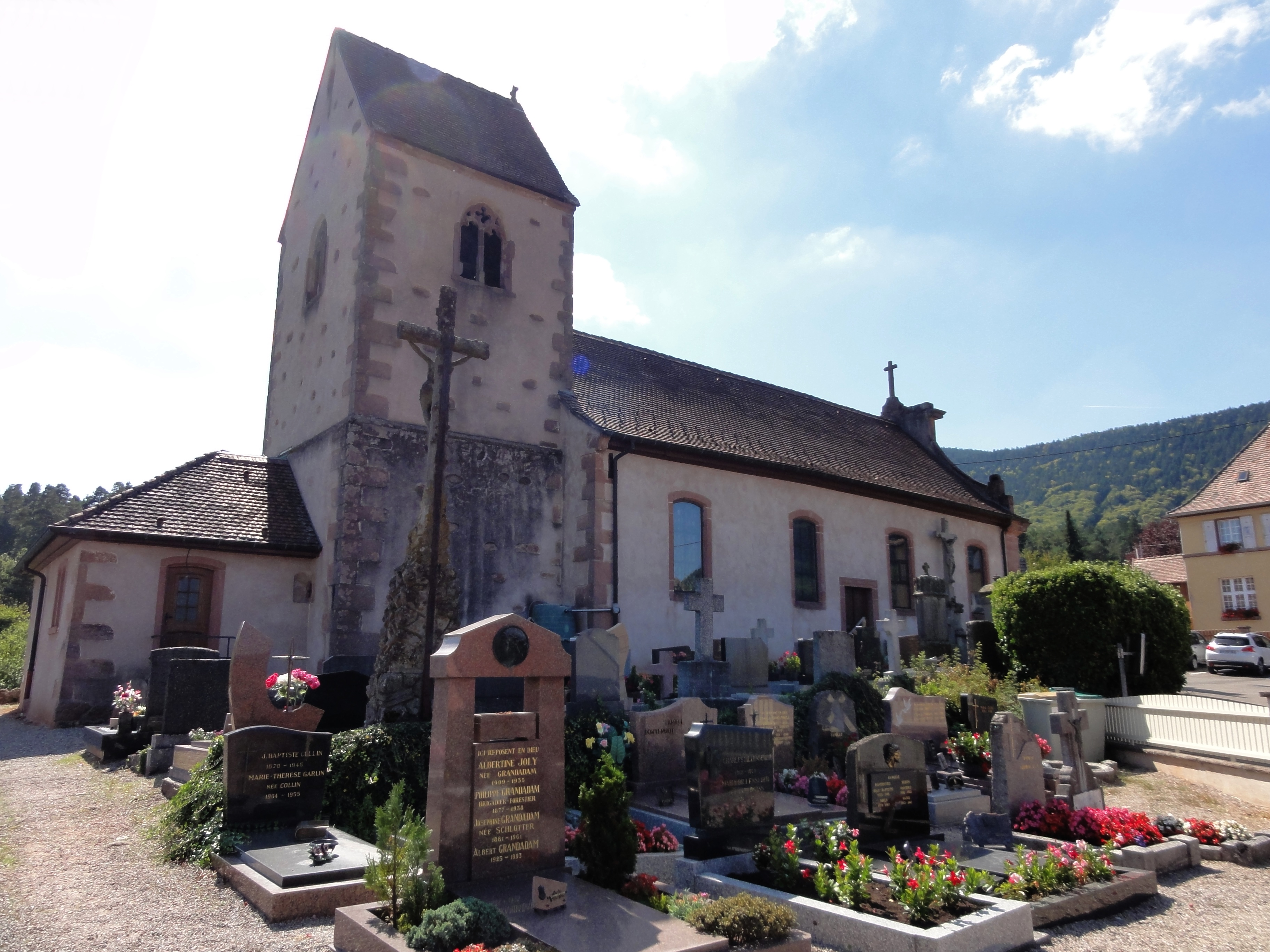 Alsace, Bas-Rhin, Église Saint-Laurent de Dieffenbach-au-Val (PA00084692, IA67010431).